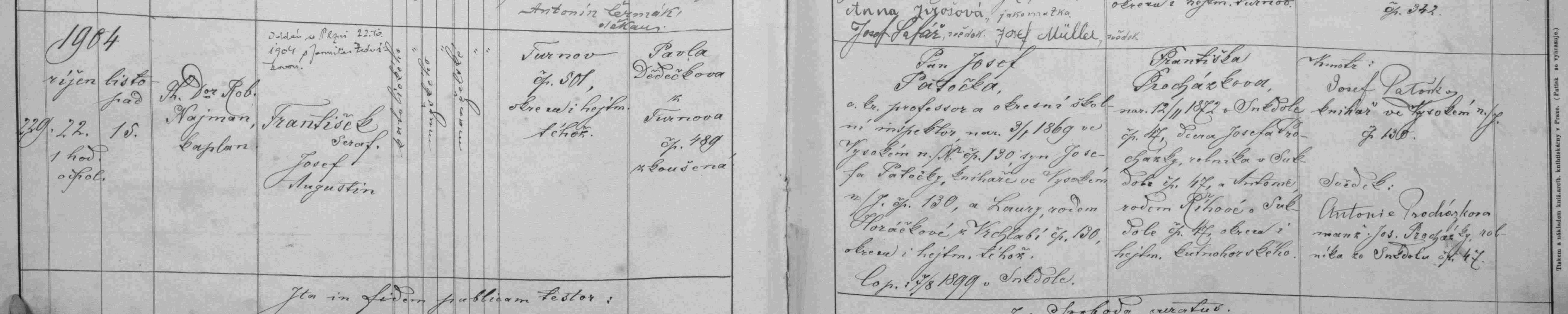 matriční zápis o narození a křtu Františka Patočky (matrika N index N 1897-1906 Turnov (SOA Zámrsk))